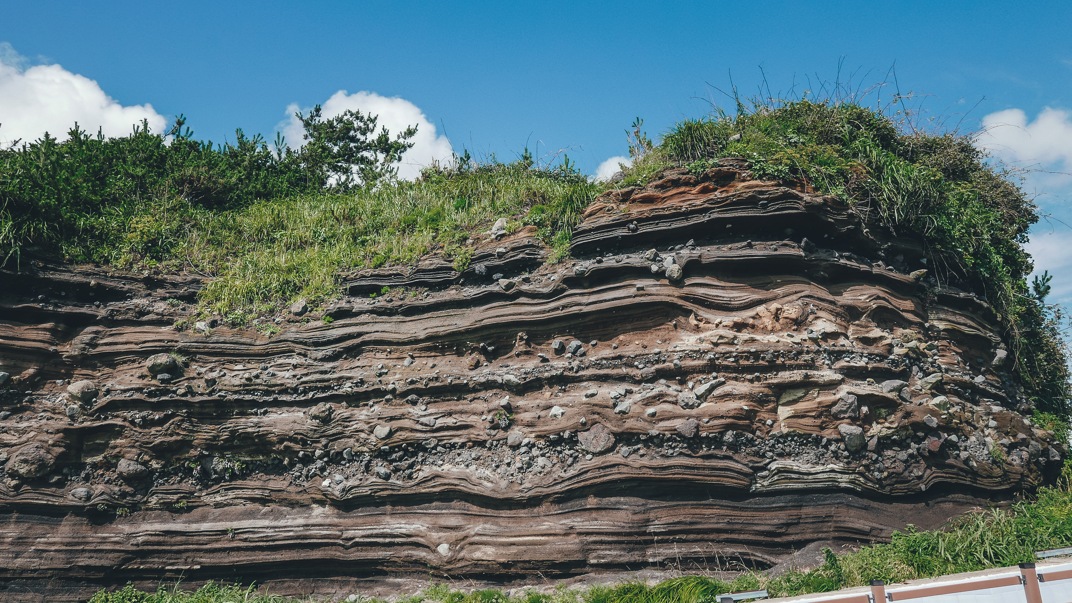 수월봉 지질